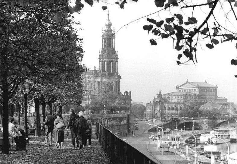 Dresden, Brühlsche Terrasse, Hofkirche, Semper-Oper ADN-ZB Oberst 16.10.1987-A-Dresden: Herbststimmung auf der Brühlschen Terrasse; im Hintergrund die Semperoper (r.) und die Hofkirche.